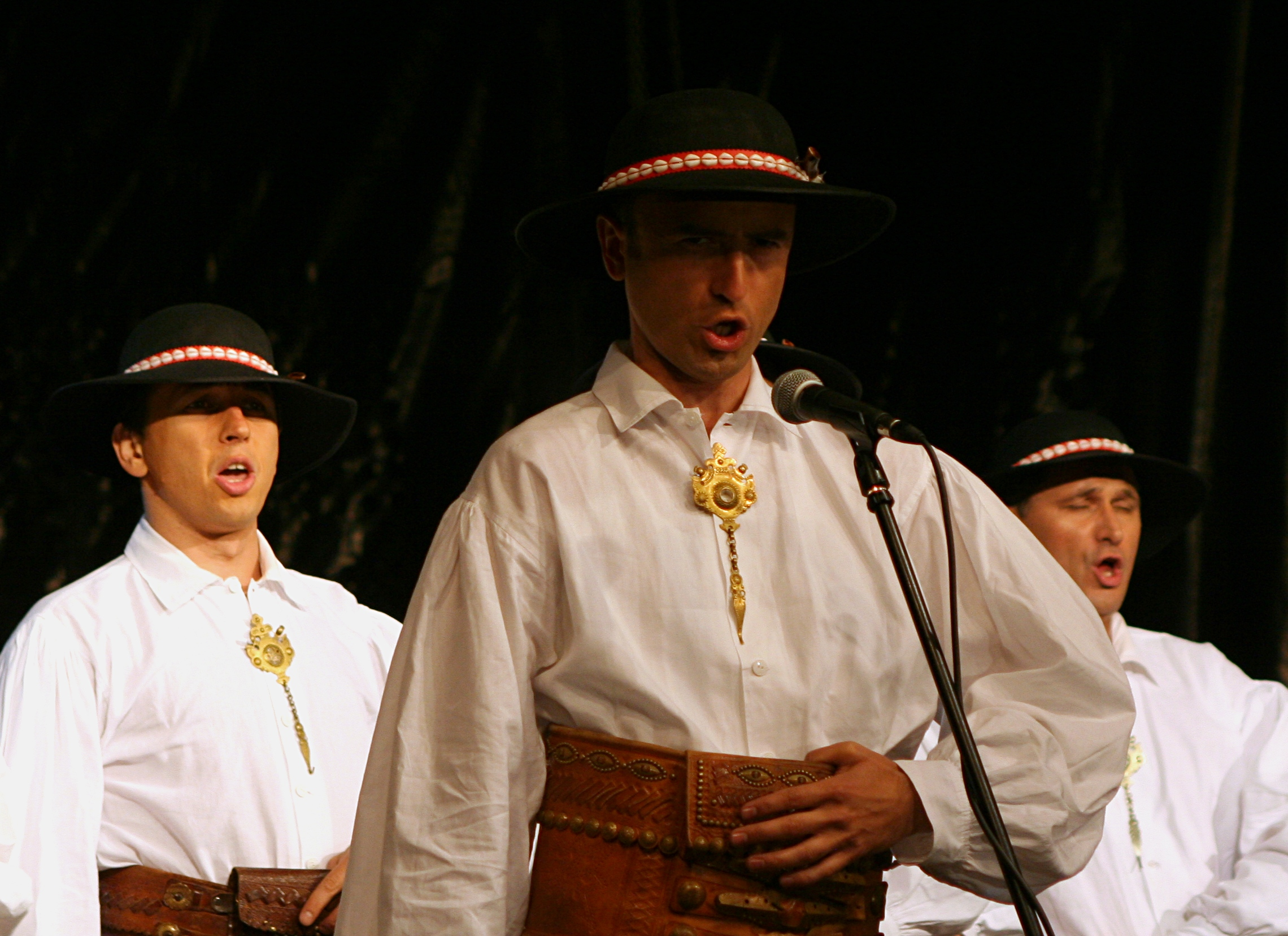 Artyści Zespołu Pieśni i Tańca Śląsk podczas występu z okazji 58 rocznicy zespołu